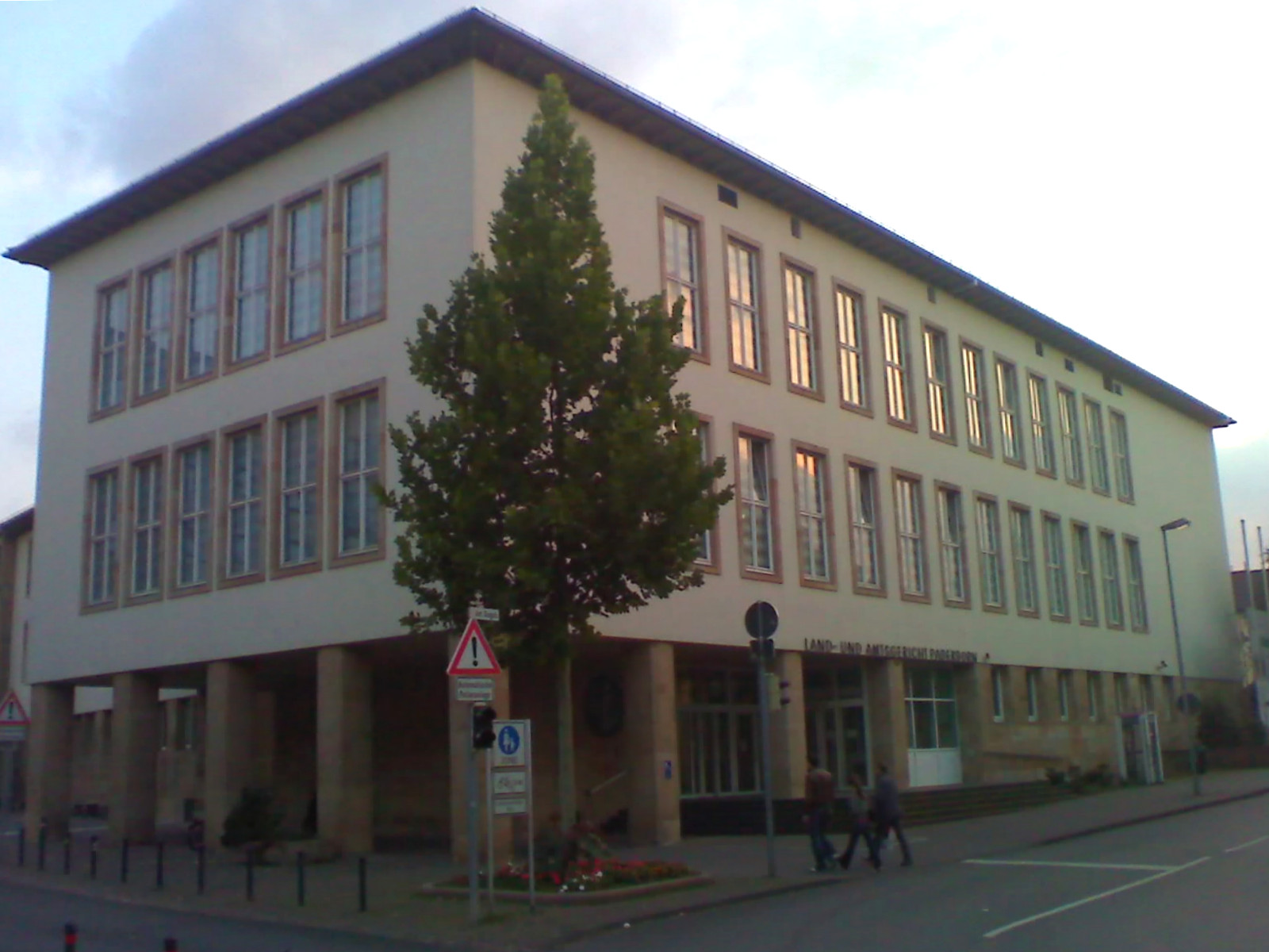 Paderborn: Land- und Amtsgericht, Haupteingang This is a photograph of an architectural monument.